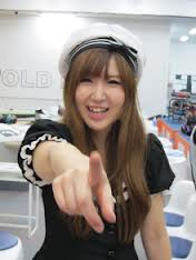 岩見彩乃選手「どーん！」